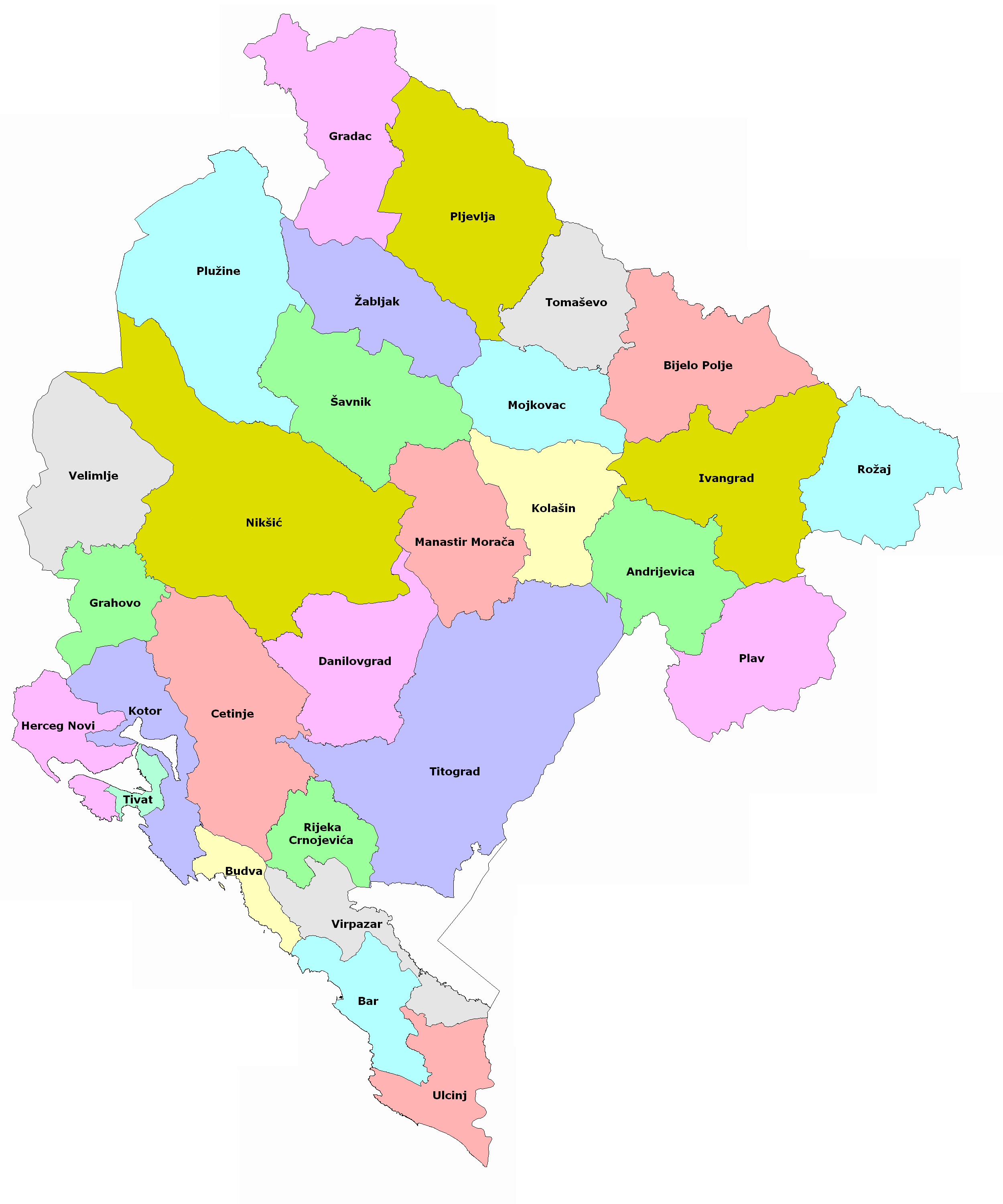 Opštine u Crnoj Gori 1957-1960. godine